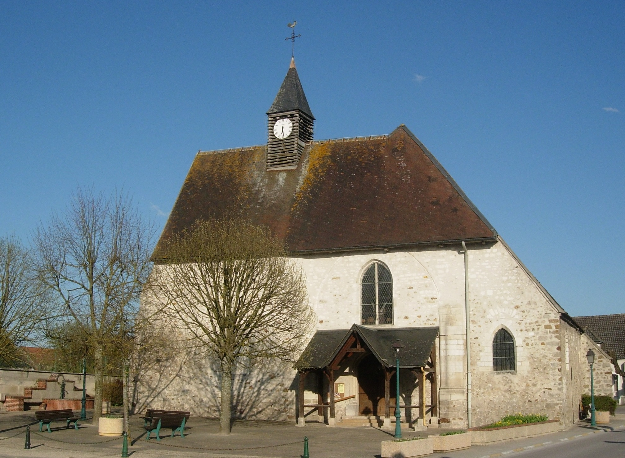 Marigny-le-Châtel : vue extérieur de l'église